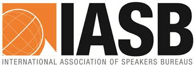 Logo de la International Association of Speakers Bureaus (IASB)